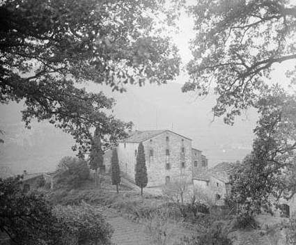 Imatge